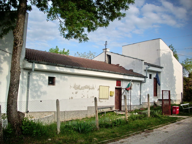 Село Бракница, община Попово - кметството